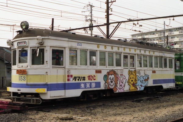 阪堺電軌モ151型153